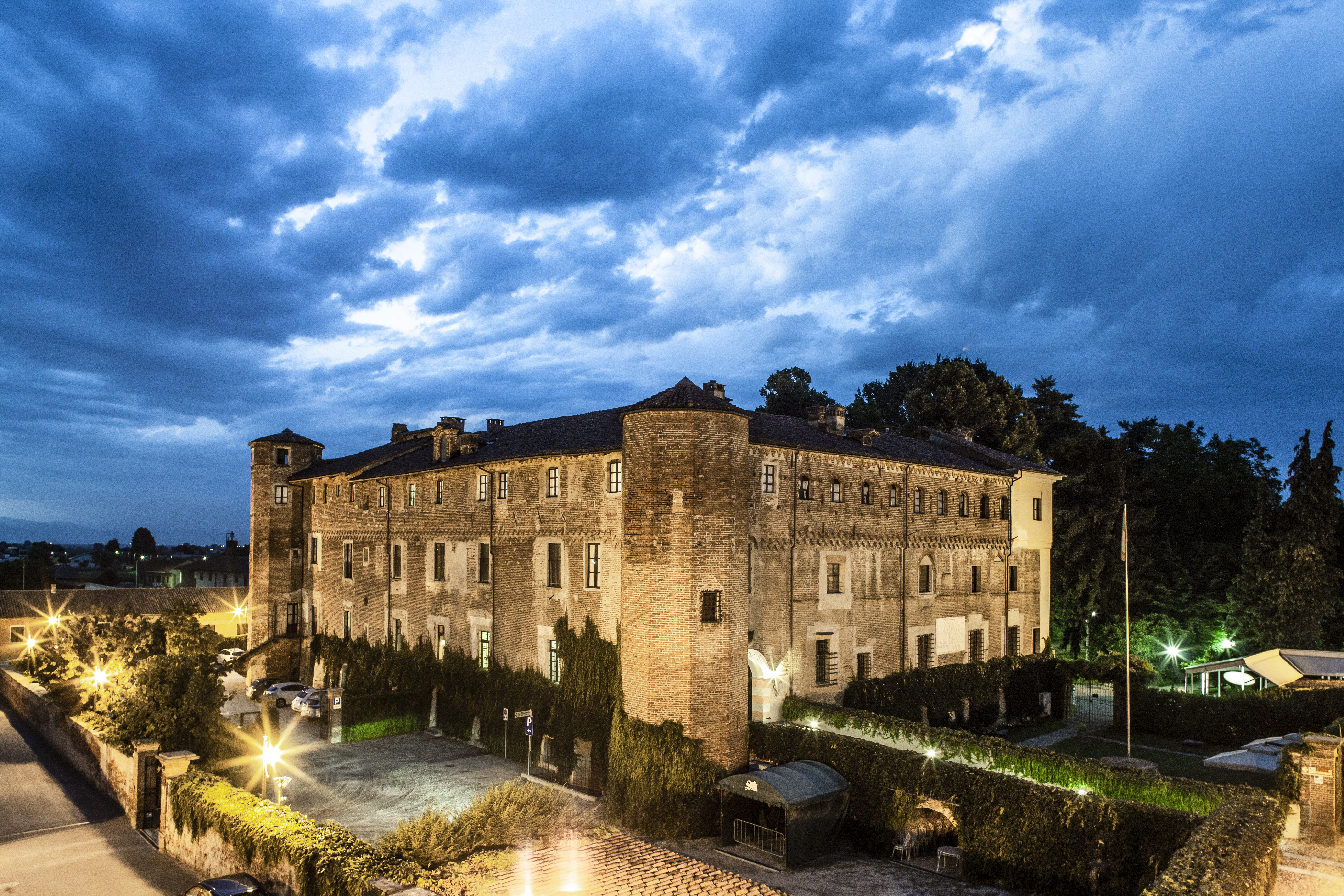 Vista con la torre Sud del castello dei Solaro